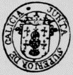 Escudo de Galiza no selo da Xunta Superior do Reino de Galiza.